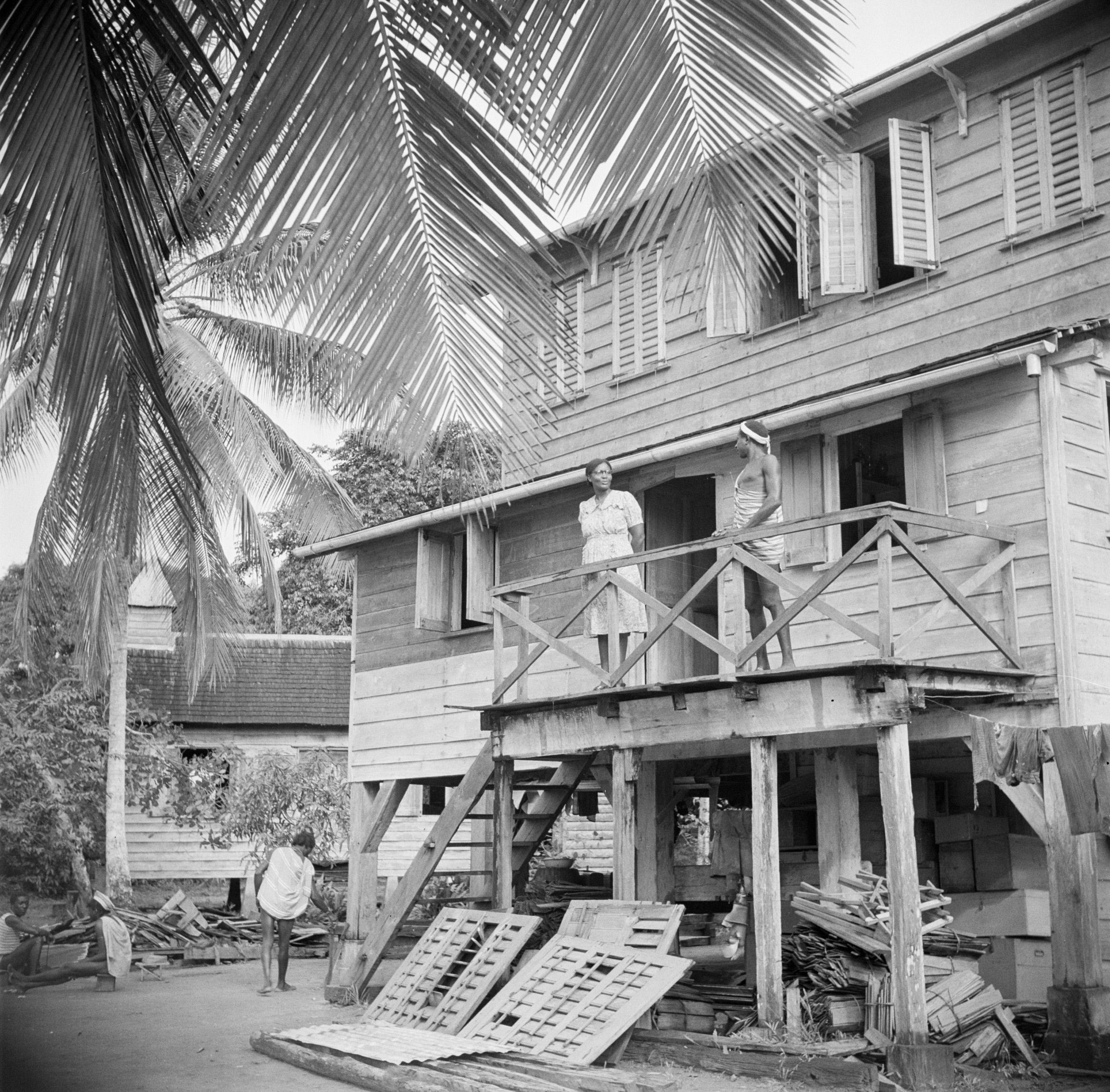 Collectie / Archief : Fotocollectie Van de Poll Reportage / Serie : Reis naar Suriname en de Nederlandse Antillen Beschrijving : Het huis van de familie Leerdam in Langetabbetje in Suriname Datum : 1947 Locatie : Langatabbetje, Marowijne, Suriname Trefwoorden : woningen Fotograaf : Poll, Willem van de, [onbekend] Auteursrechthebbende : Nationaal Archief Materiaalsoort : Negatief (zwart/wit) Nummer archiefinventaris : bekijk toegang 2.24.14.02 Bestanddeelnummer : 252-6733